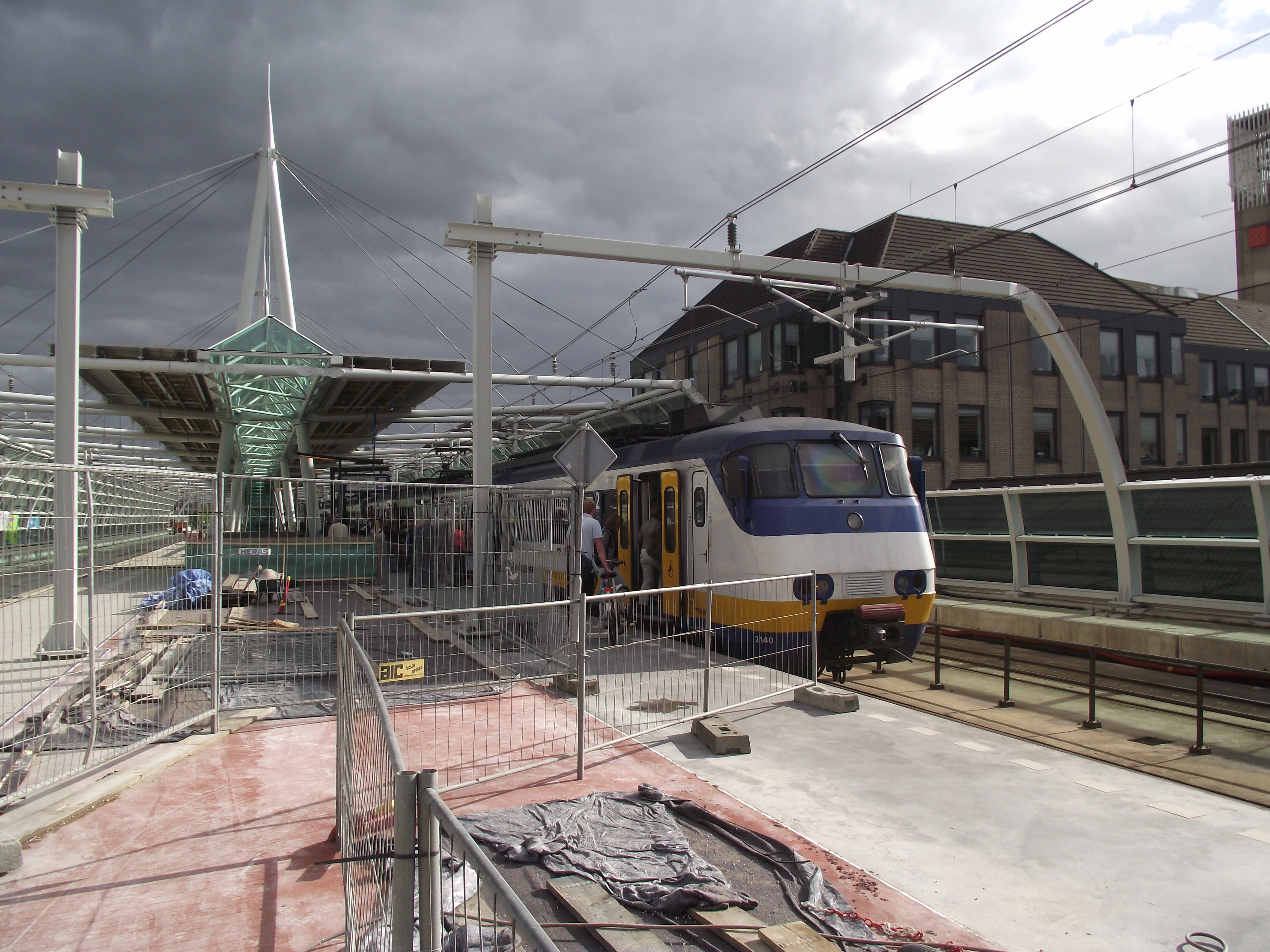 Stoptrein stopt bij het nieuwe middenperron. Alleen de twee voorste sporen zijn in gebruik.